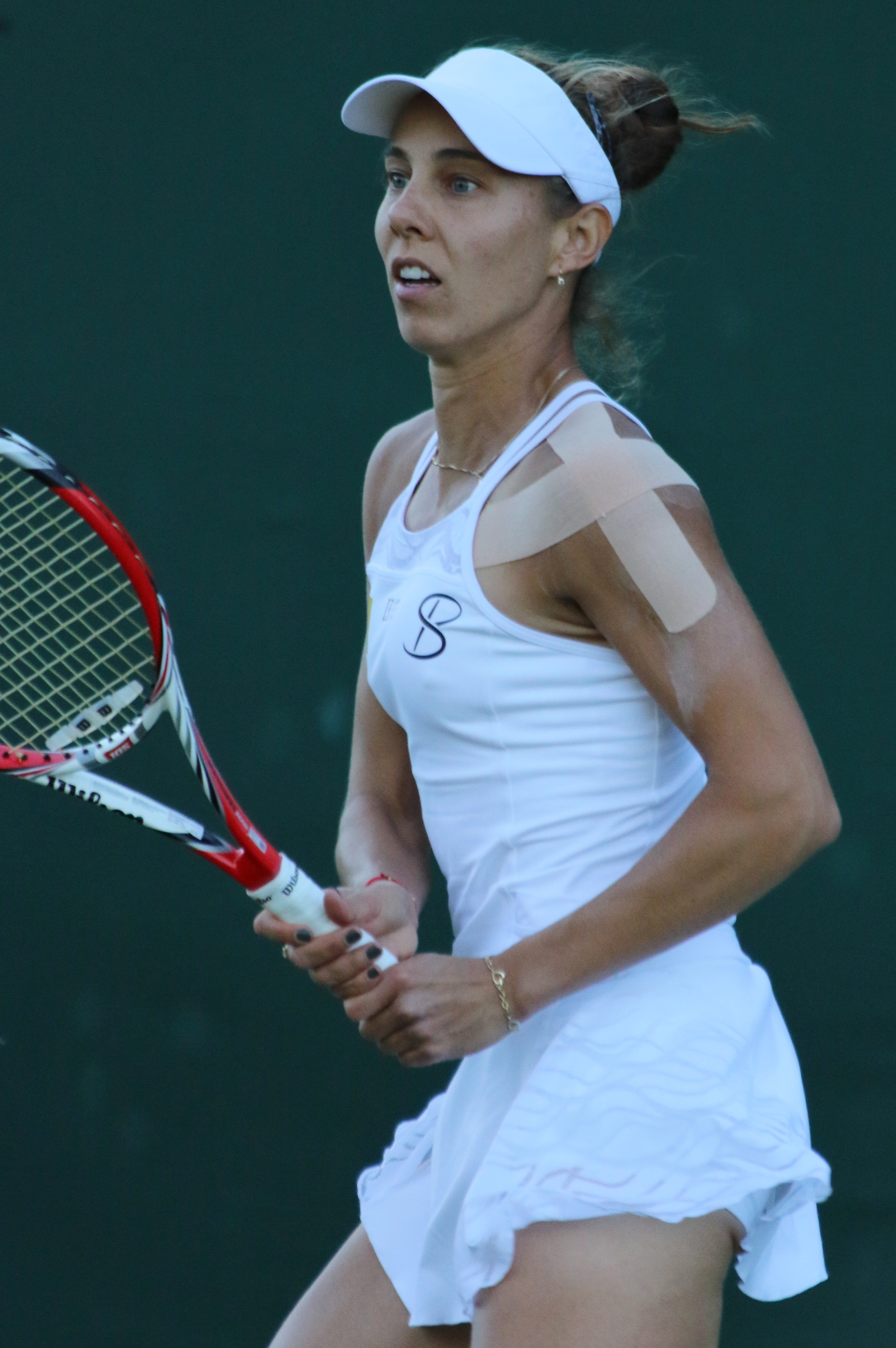 Buzarnescu WM18 (8)